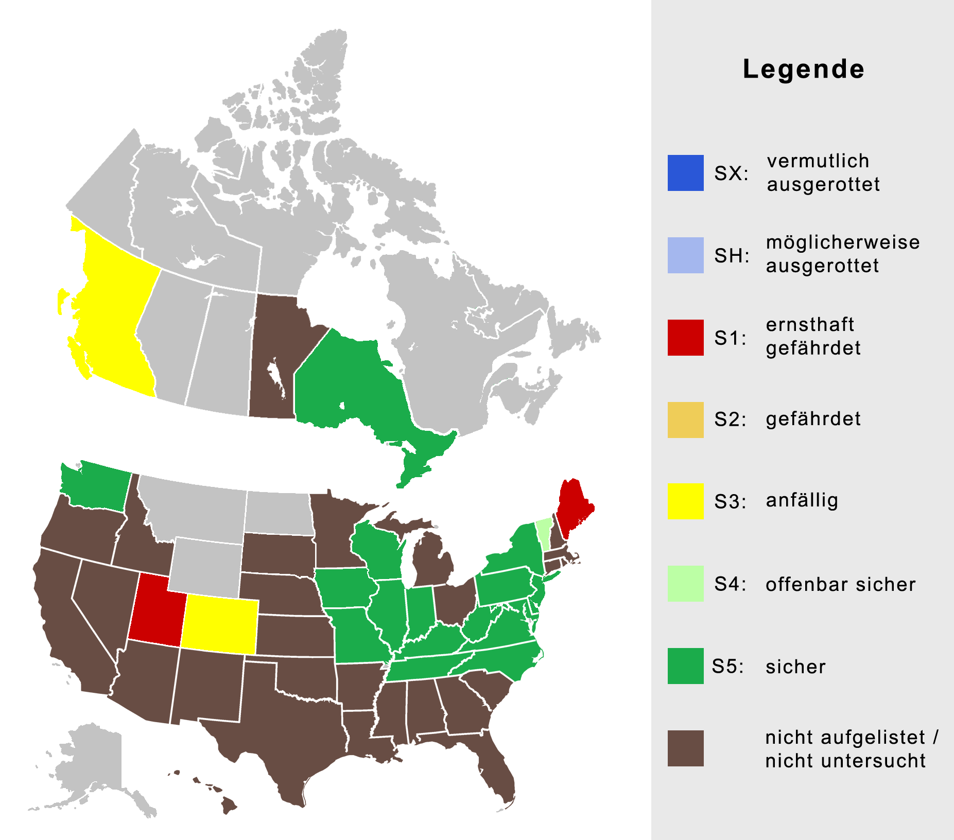 Schutzstatus der Pachydiplax longipennis in Nordamerika